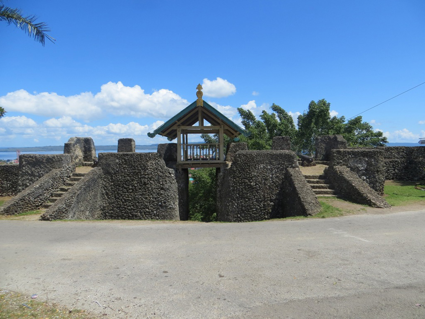 Benteng Wolio atau Benteng Keraton Buton merupakan salah satu objek wisata bersejarah di Kota Baubau